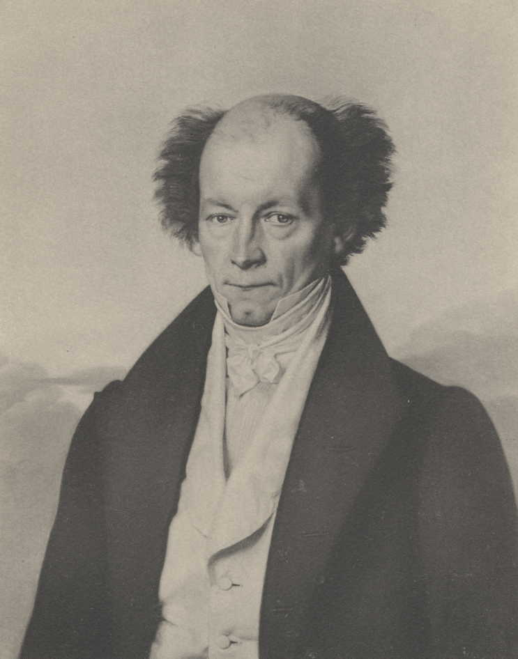 Bildnis des Greifswalder Professors Johann August Grunert (1797–1872)